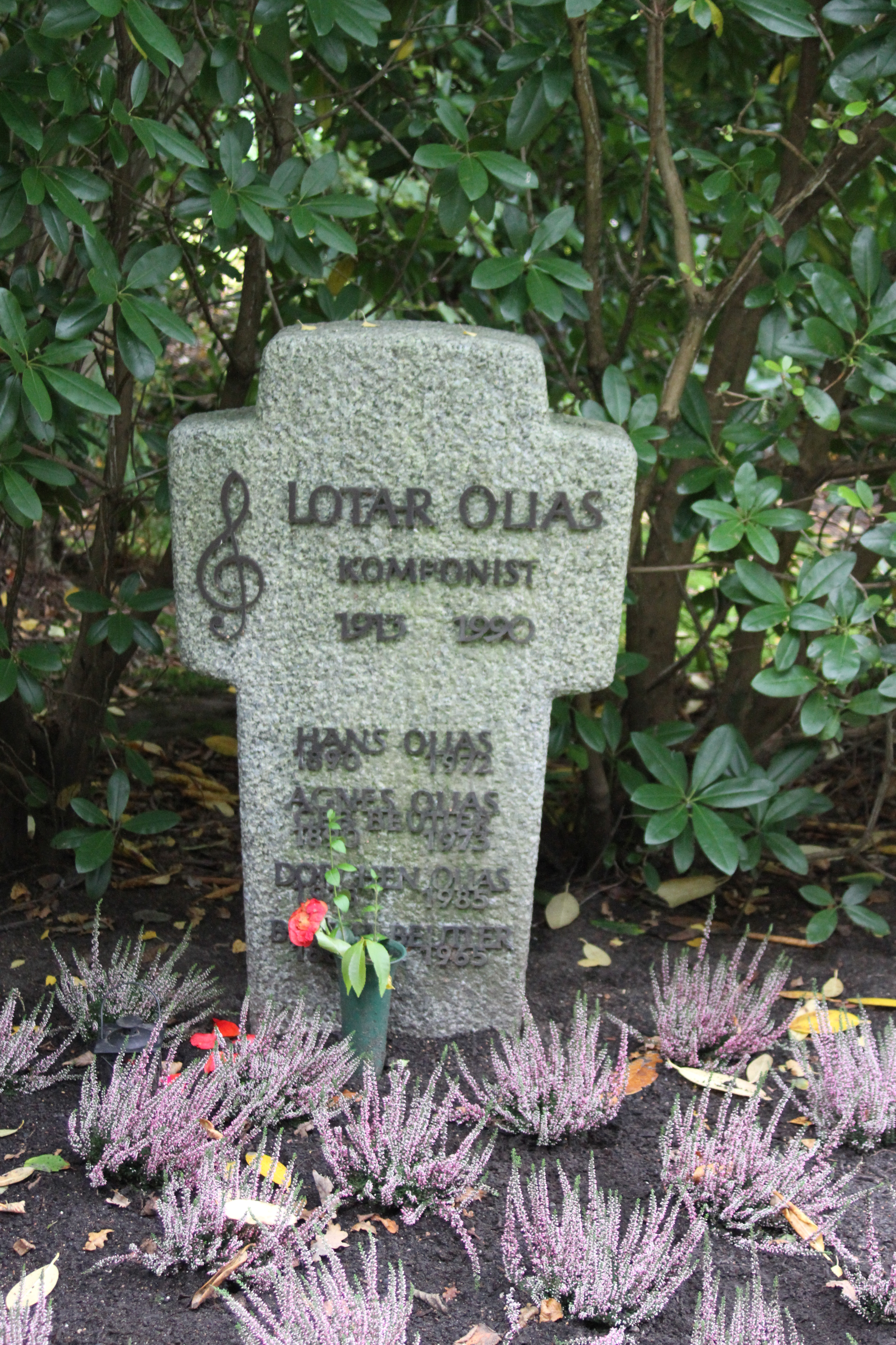 Lotar Olias (* 23. Dezember 1913 in Königsberg in Preußen; † 21. Oktober 1990 in Hamburg) war ein deutscher Komponist und Textdichter der 1920er bis 1960er Jahre, der oft in Partnerschaft mit den Textdichtern Peter Moesser und Günter Loose zusammenarbeitete.